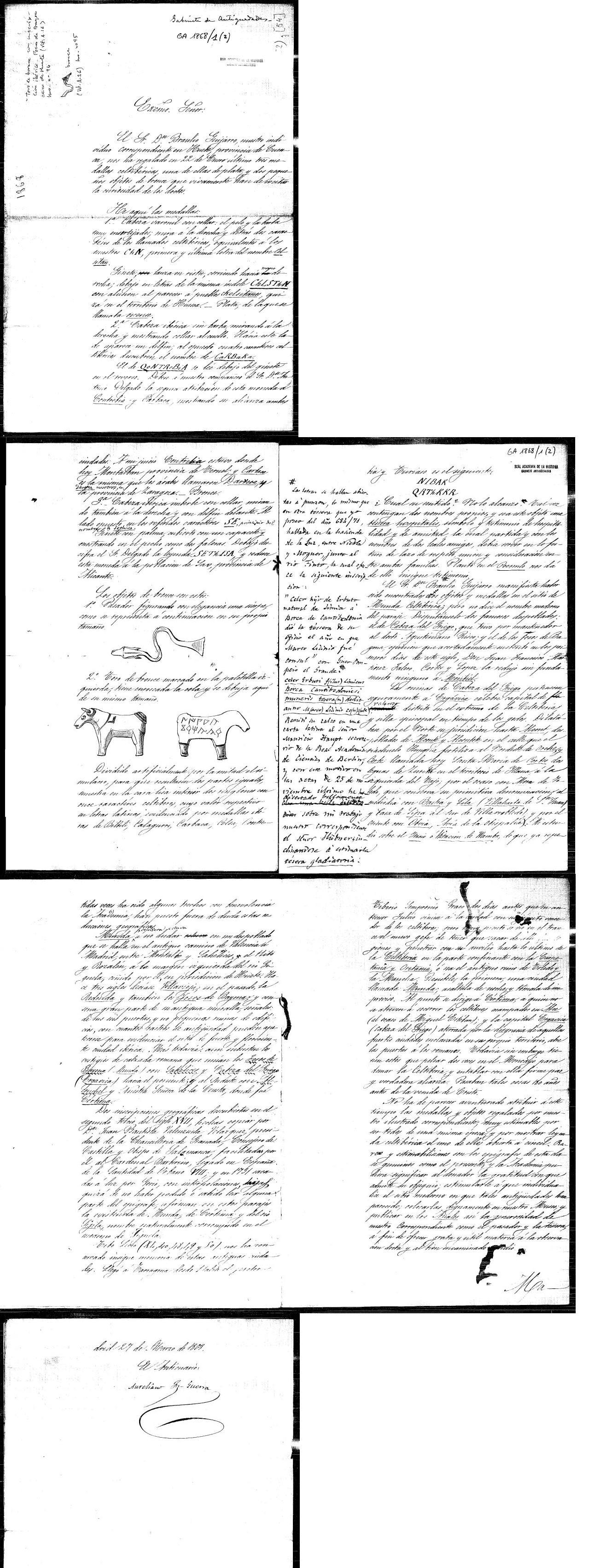 Informe de 1868 sobre dos téseras de hospitalidad y monedas procedentes de Contrebia Cárbica que fueron donados a la Academia de la Historia de España.